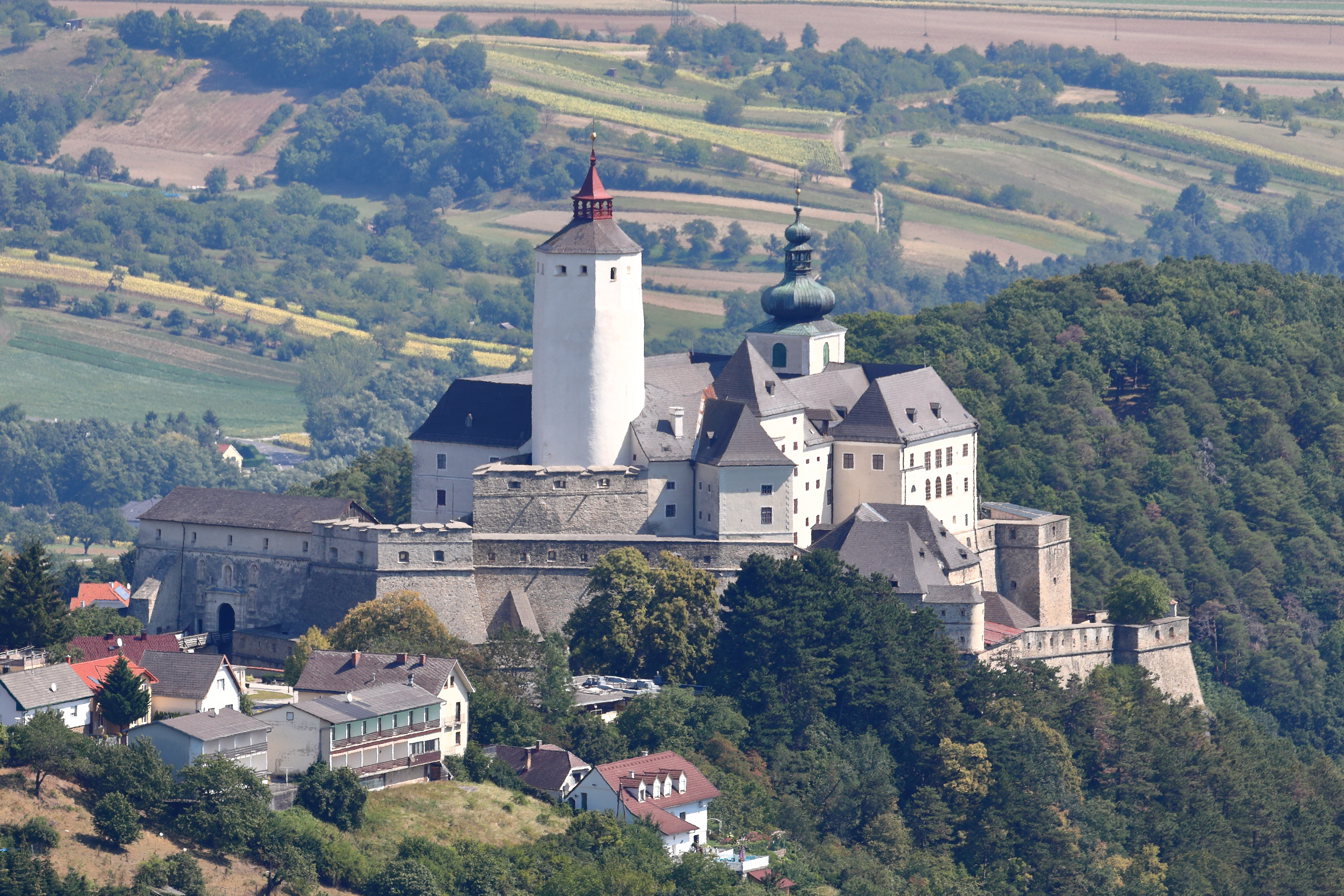 Fernansicht vom 748 m hohen Heuberg bzw. Südwestansicht der Burg Forchtenstein in Neustift an der Rosalia, ein Ortsteil der burgenländischen Gemeinde Forchtenstein.Die Burg befindet sich auf einem steilen Dolomitfelsen am Ostabhang des Rosaliengebirges und sicherte die Straßenverbindung Wr. Neustadt - Ödenburg (heutiges Sopron). Sie wurde ab dem 14. Jahrhundert von den Grafen von Mattersdorf errichtet. Nachdem die Burg 1626 in den Besitz der Esterházy gelangte, wurde sie im 17. Jahrhundert umfangreich um- und ausgebaut.